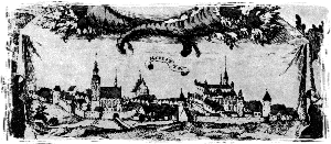 Panorama Lidzbarka Warmińskiego